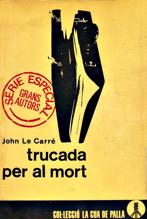 Porta d'un dels números de la mítica col·lecció.